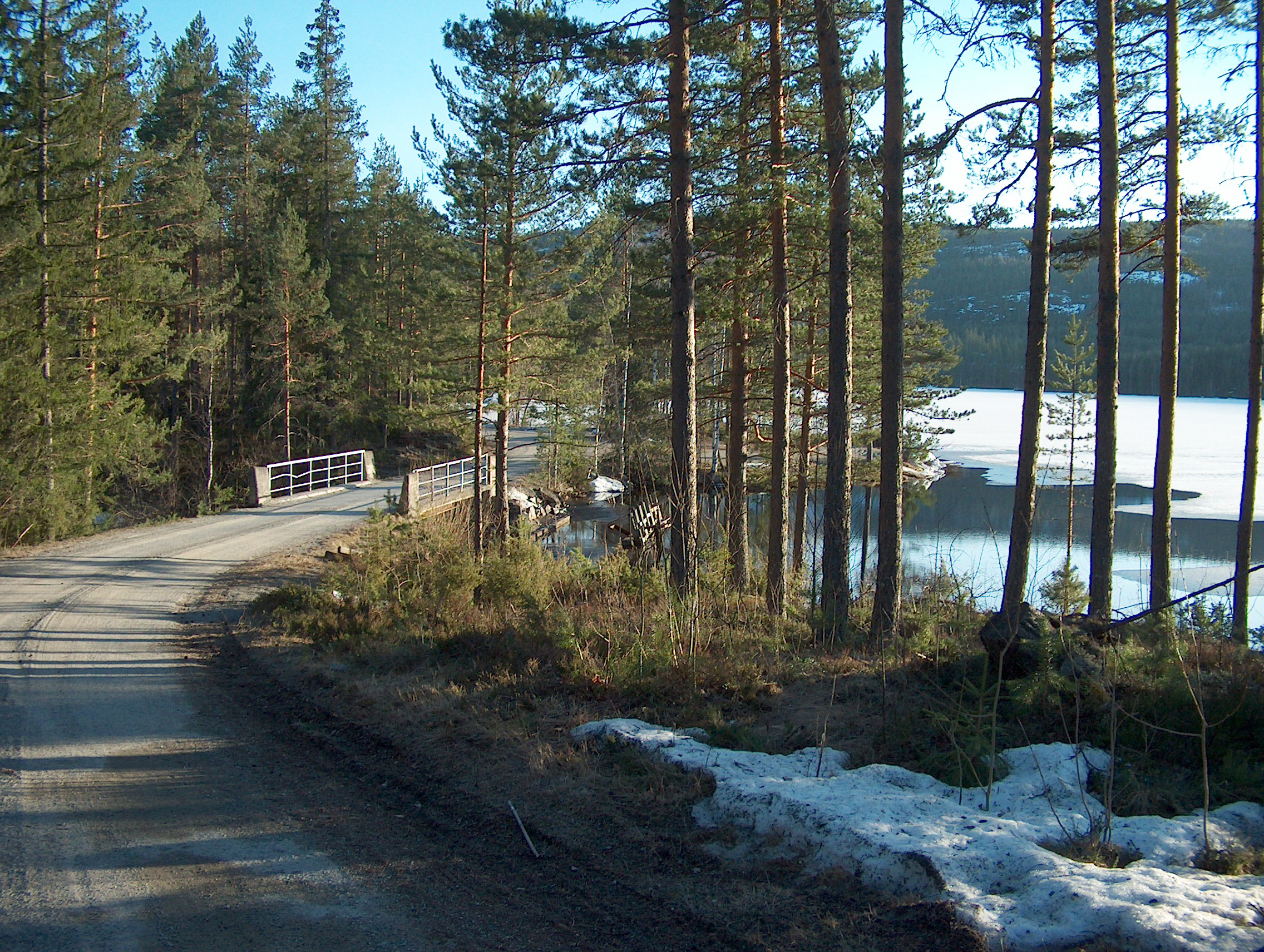 Breivassdammen (ved krysset mellom Rallerud, Brekkebygda og Sokna)